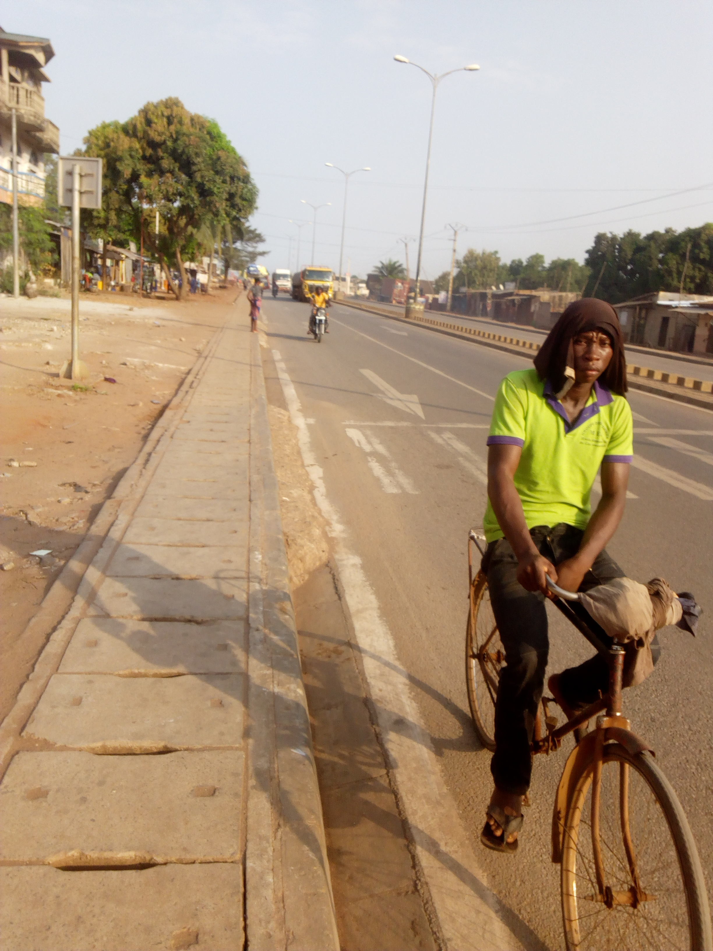 Un Mr sur un vélo de l'antiquité sur la route Akassato calavi This is an image with the theme "Africa on the Move or Transport" from: Benin